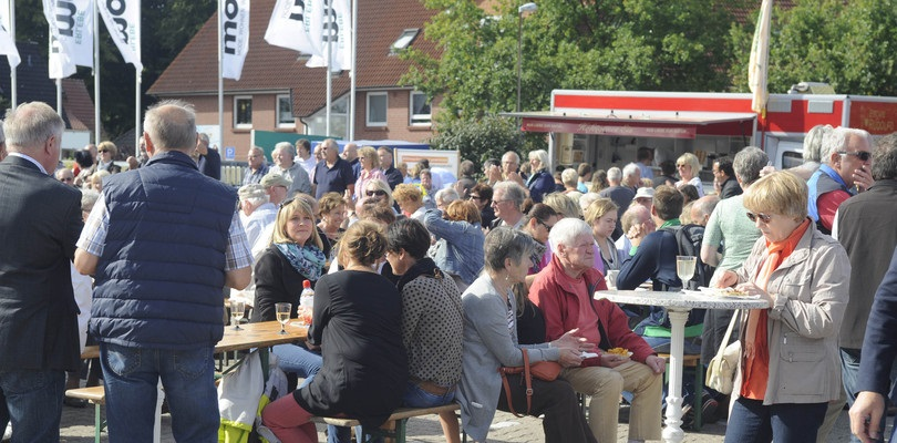 Buschteichfest